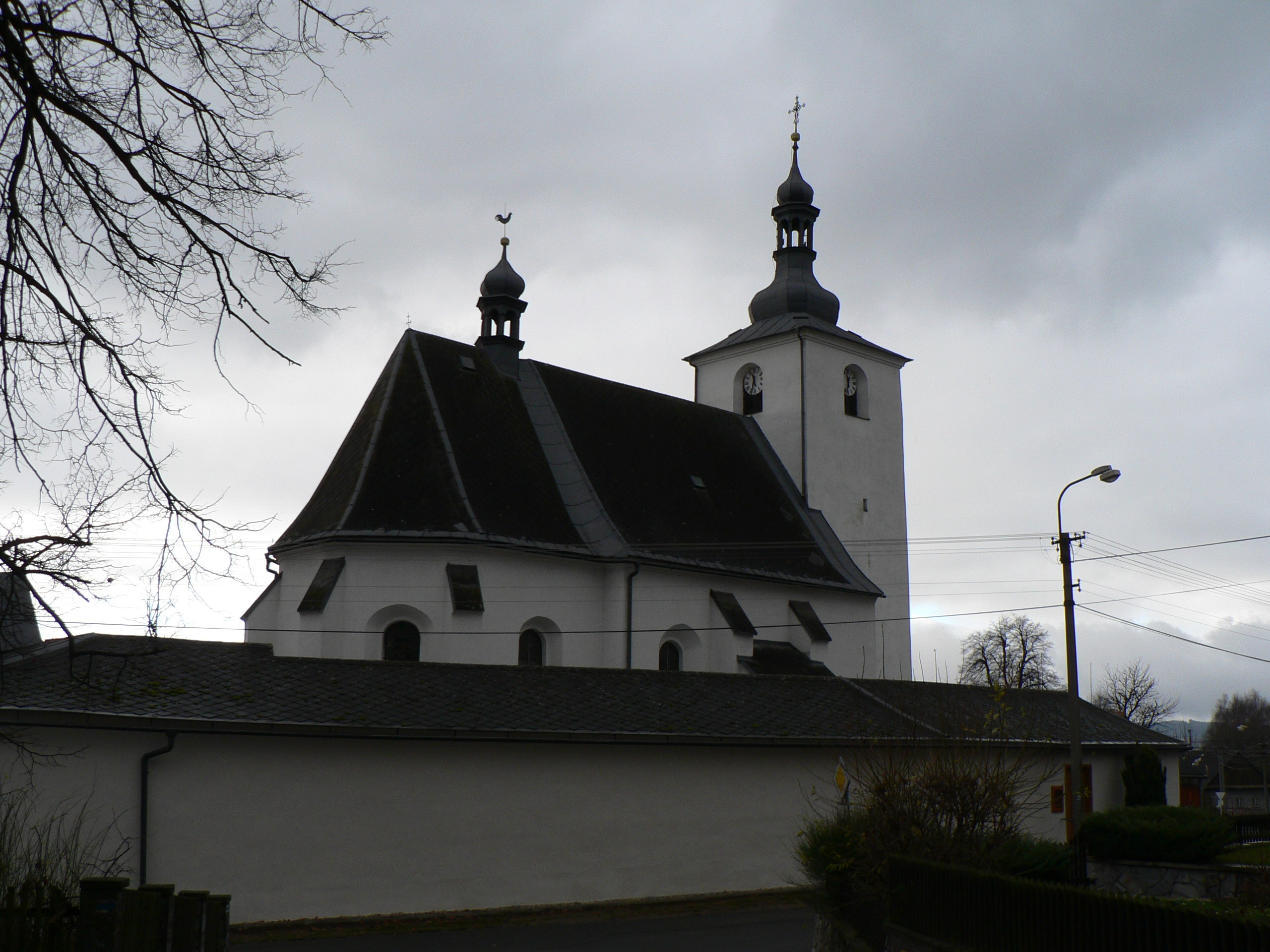 Kostel svatého Linharta (Horní Studénky)